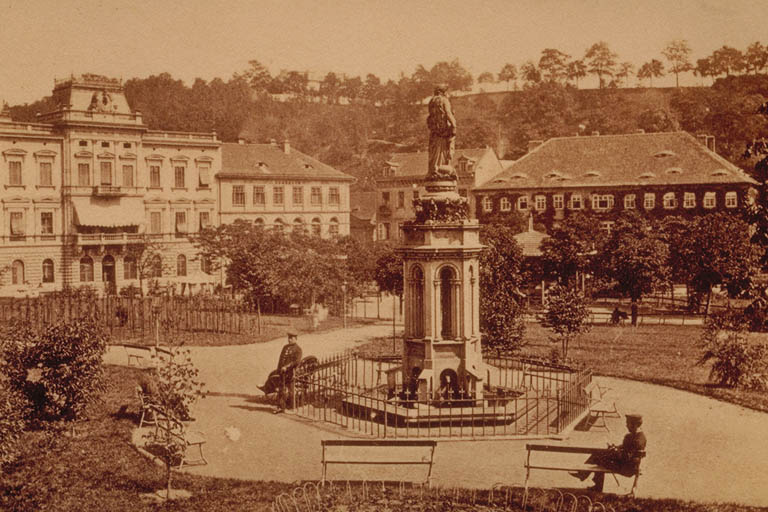 Teplice, Lázeňská zahrada